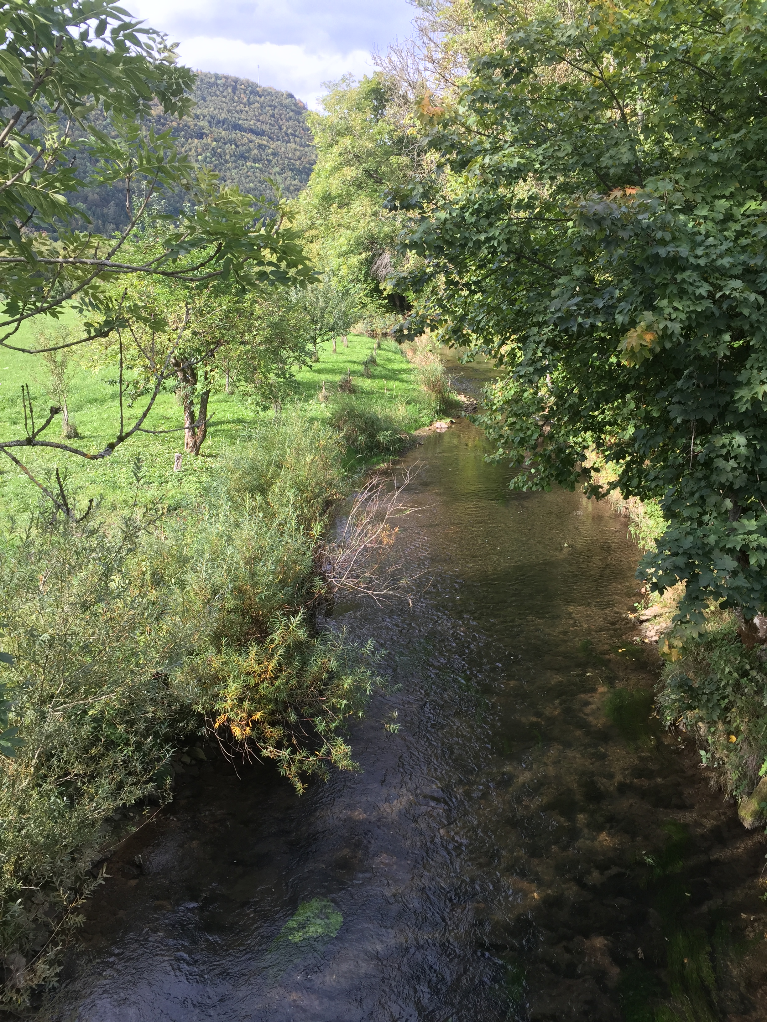 Die Bära unterhalb des Naturschutzgebietes Galgenwiesen, wo Obere und Untere Bära zusammenfließen.